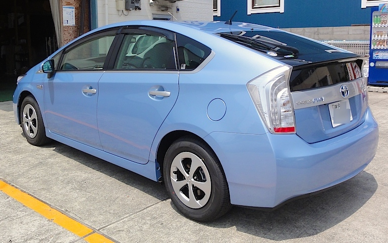 プリウスPHV（ZVW35、市販車）